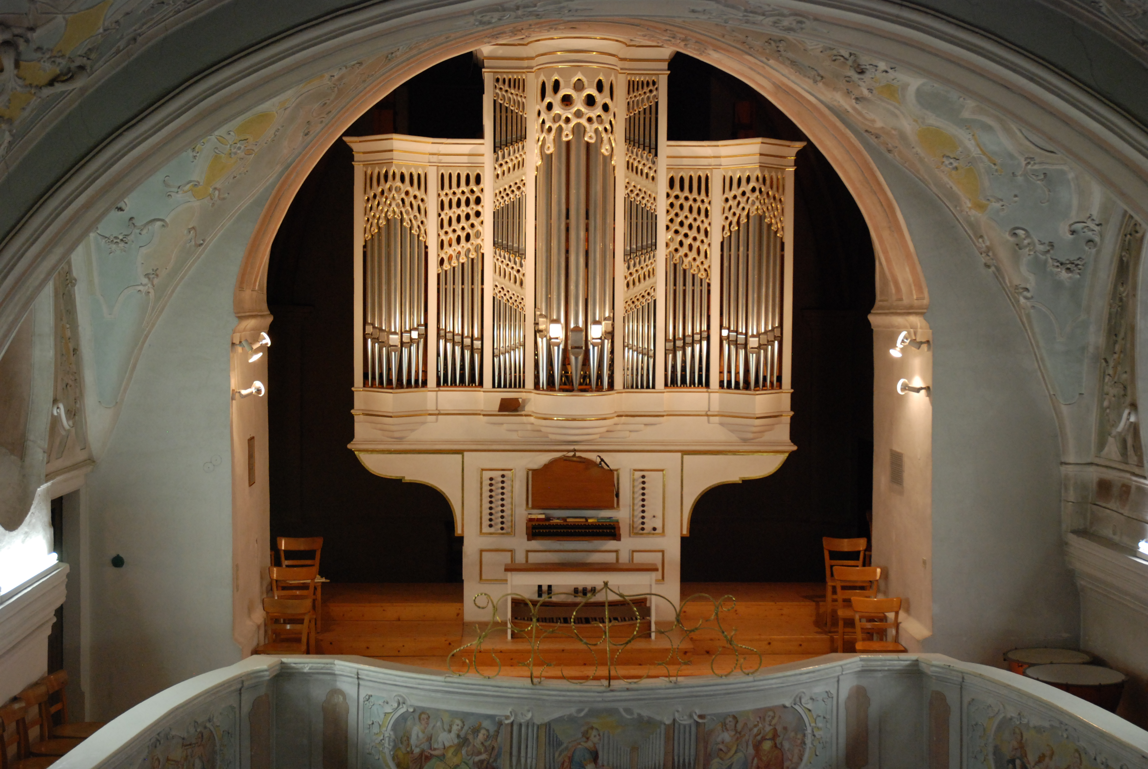 Orgel der Klosterkirche Rebdorf